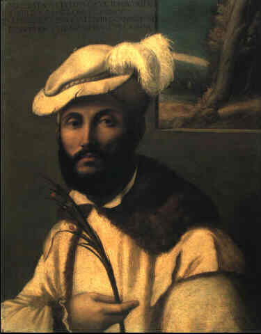 Retrato de hombre barbado con sombrero de plumas